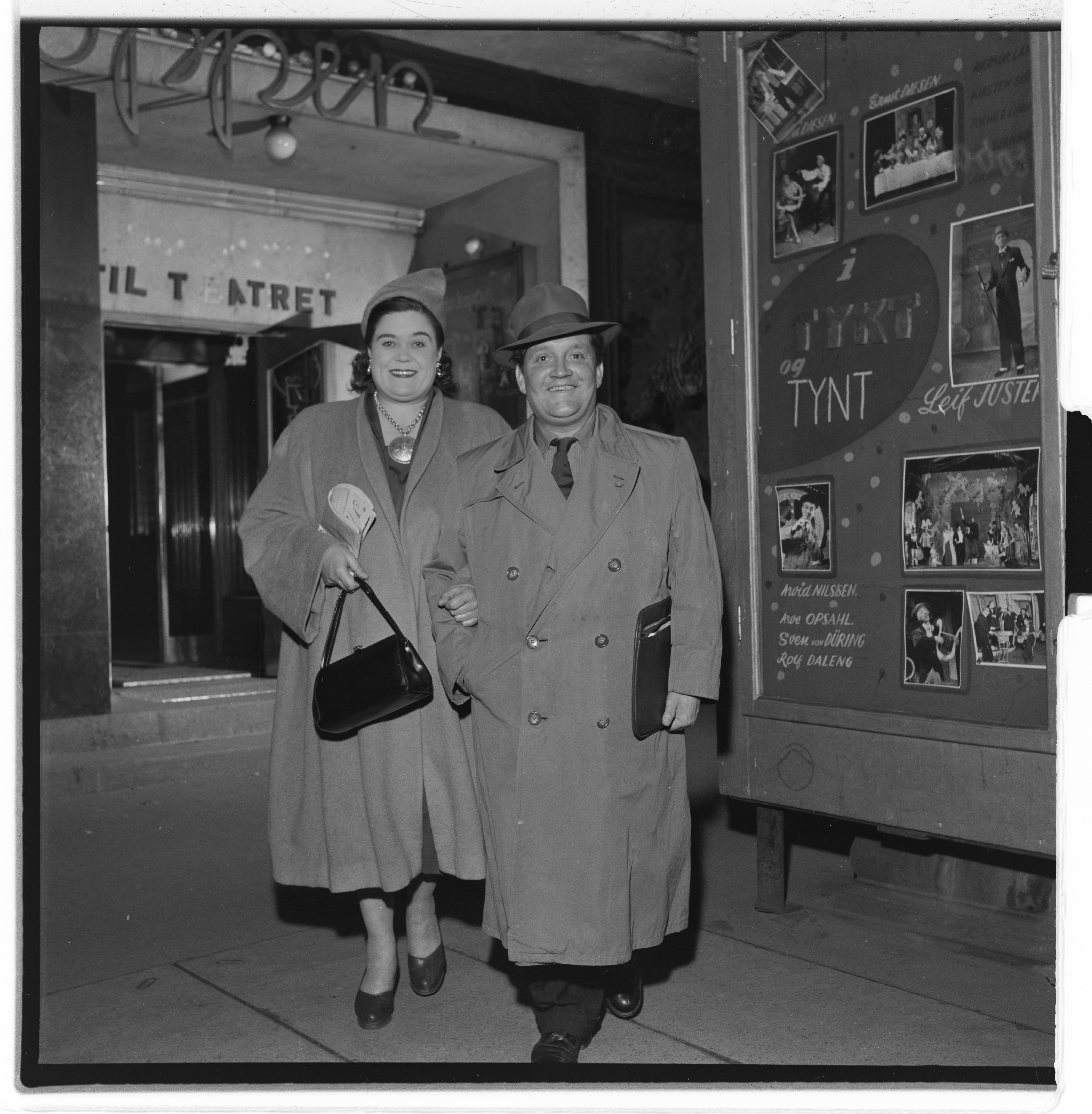 Bildet er hentet fra Arkivverket. Kari Diesen, 25-års scenejubileum. NÅ nr. 21, 1955 Arkivinstitusjon : Riksarkivet Arkivnavn : Billedbladet NÅ Sted : Norge, Oslo, Oslo, Emneord: Skuespillere, Teater, Revy Avbildet: Diesen, Kari;Diesen Ernst